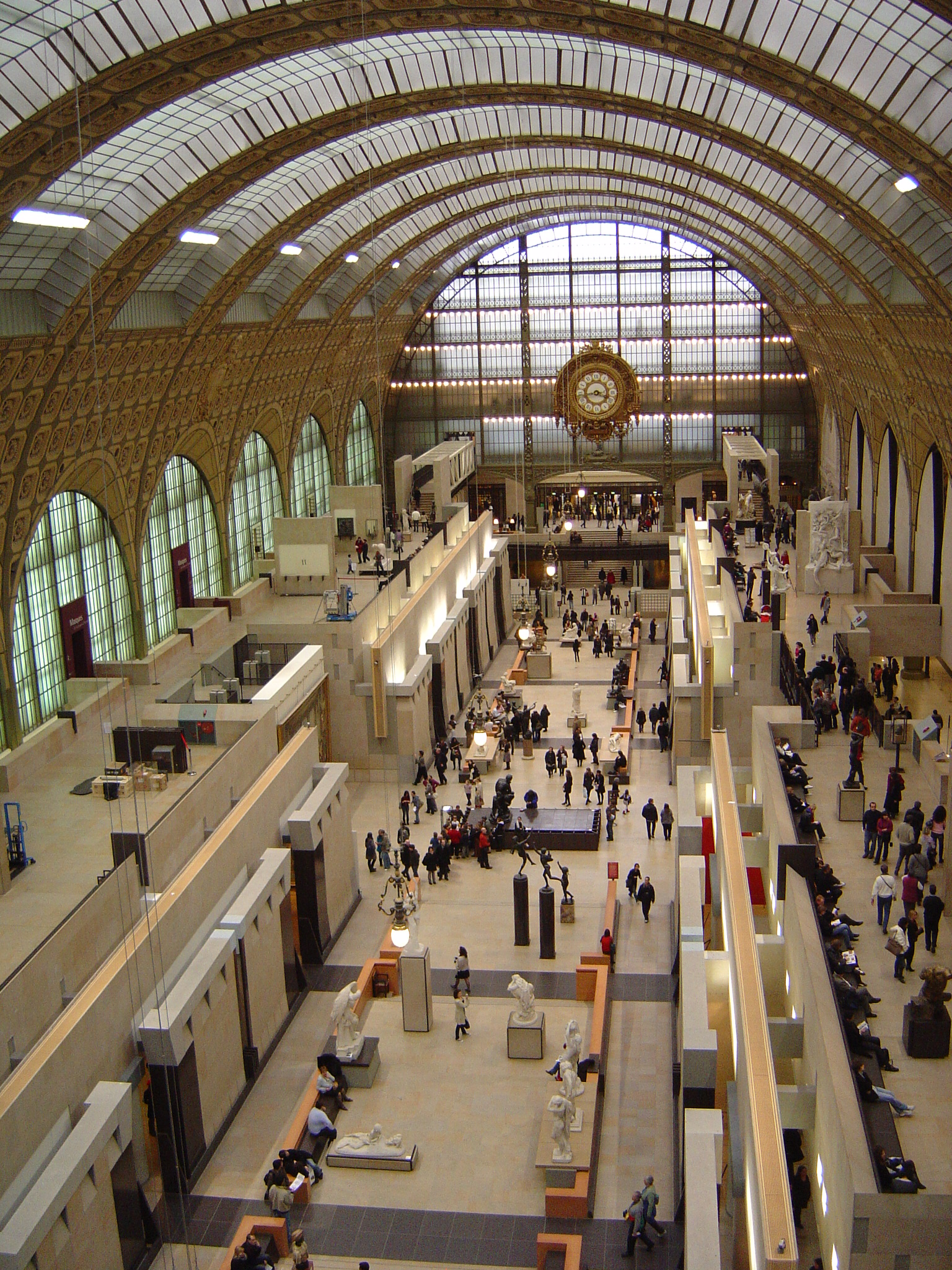 Hall du musée d'Orsay